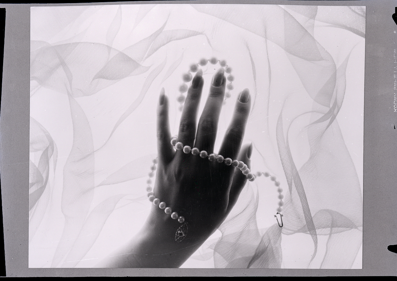 Servizio fotografico : Milano, 1970 / Paolo Monti. - Buste: 2, Fototipi: 2 : Negativo b/n, gelatina bromuro d'argento/ pellicola ; 13x18. - ((Serie costituita da 2 buste sciolte di negativi identificati con i nn.: 22559, 22560. - La suddetta serie è contenuta nella scatola G22523-22581, formato 18x24, e identificata con l'iscrizione didascalica manoscritta a pennarello nero: "Varie".